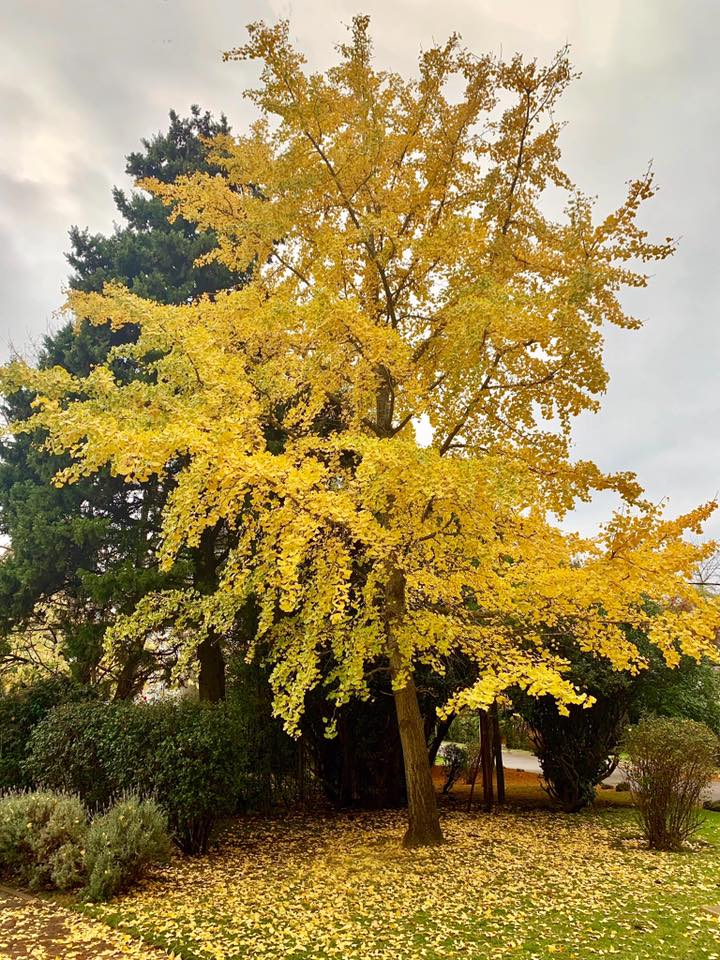 Ginko Bilova en Montevideo, Uruguay